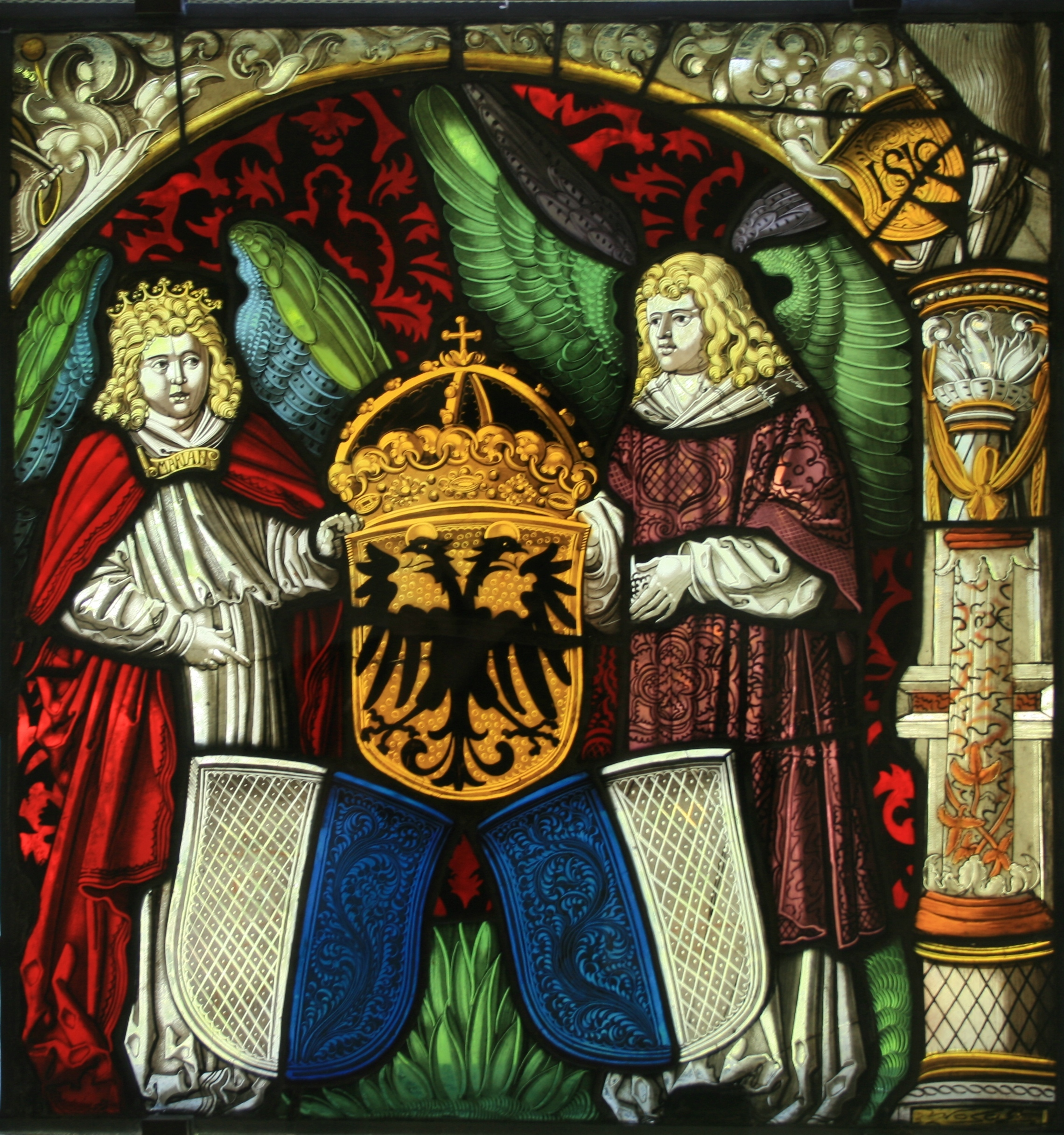 Wappenscheibe (West II 2) im Kreuzgang des Klosters Wettingen mit Wappen des Reiches und des Standes Luzern